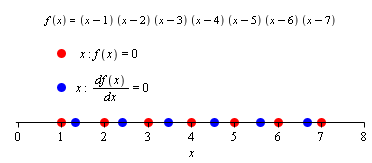 Корни многочлена седьмой степени и его производной. Все корни показанного здесь многочлена действительные, поэтому и все корни его производной — также действительные, и между каждыми двумя последовательными корнями многочлена лежит корень его производной.Это — следствие теоремы Ролля. Нарисовано в Maple.